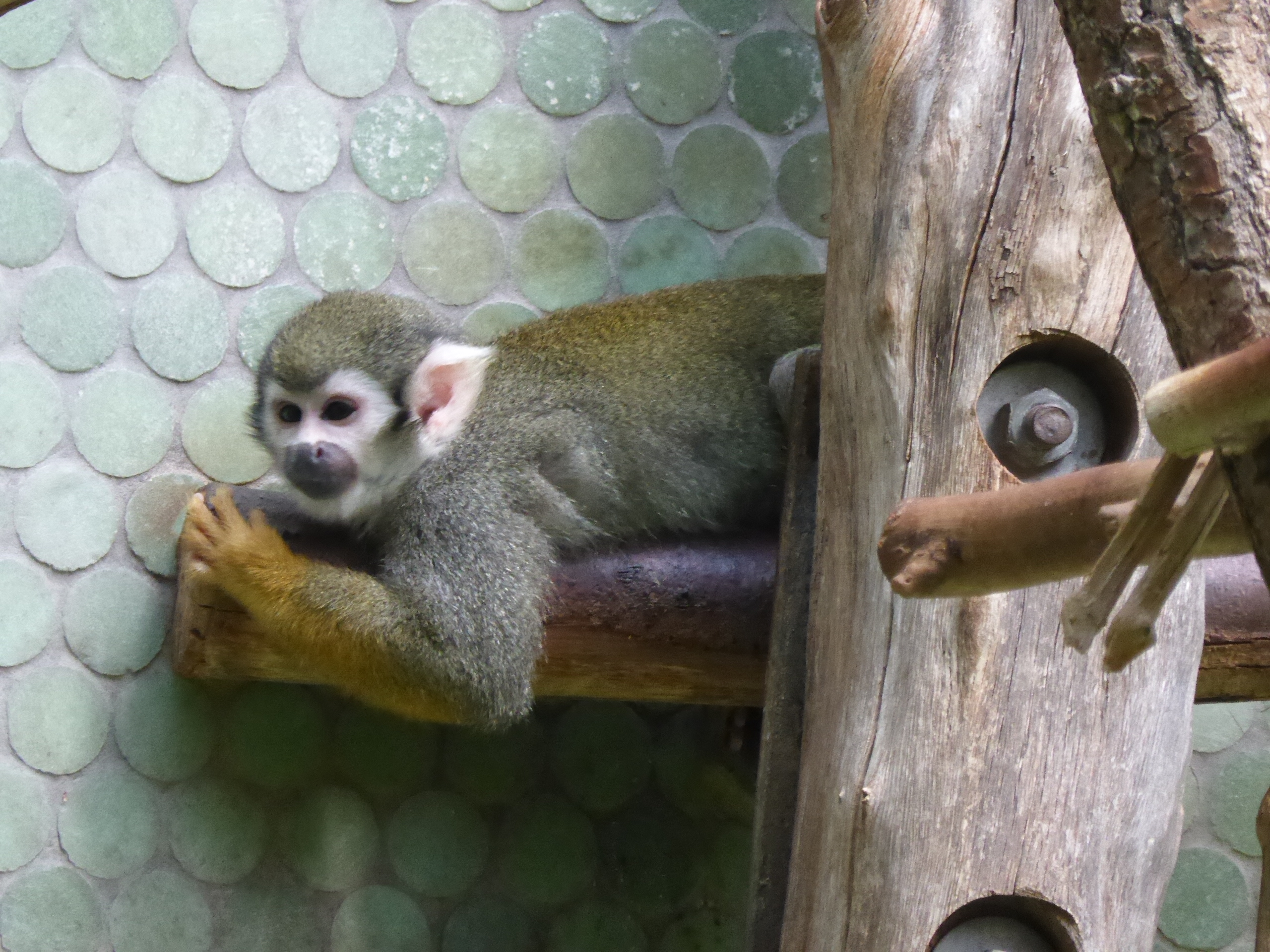 Totenkopfaffe im Tierpark Hellabrunn (München)